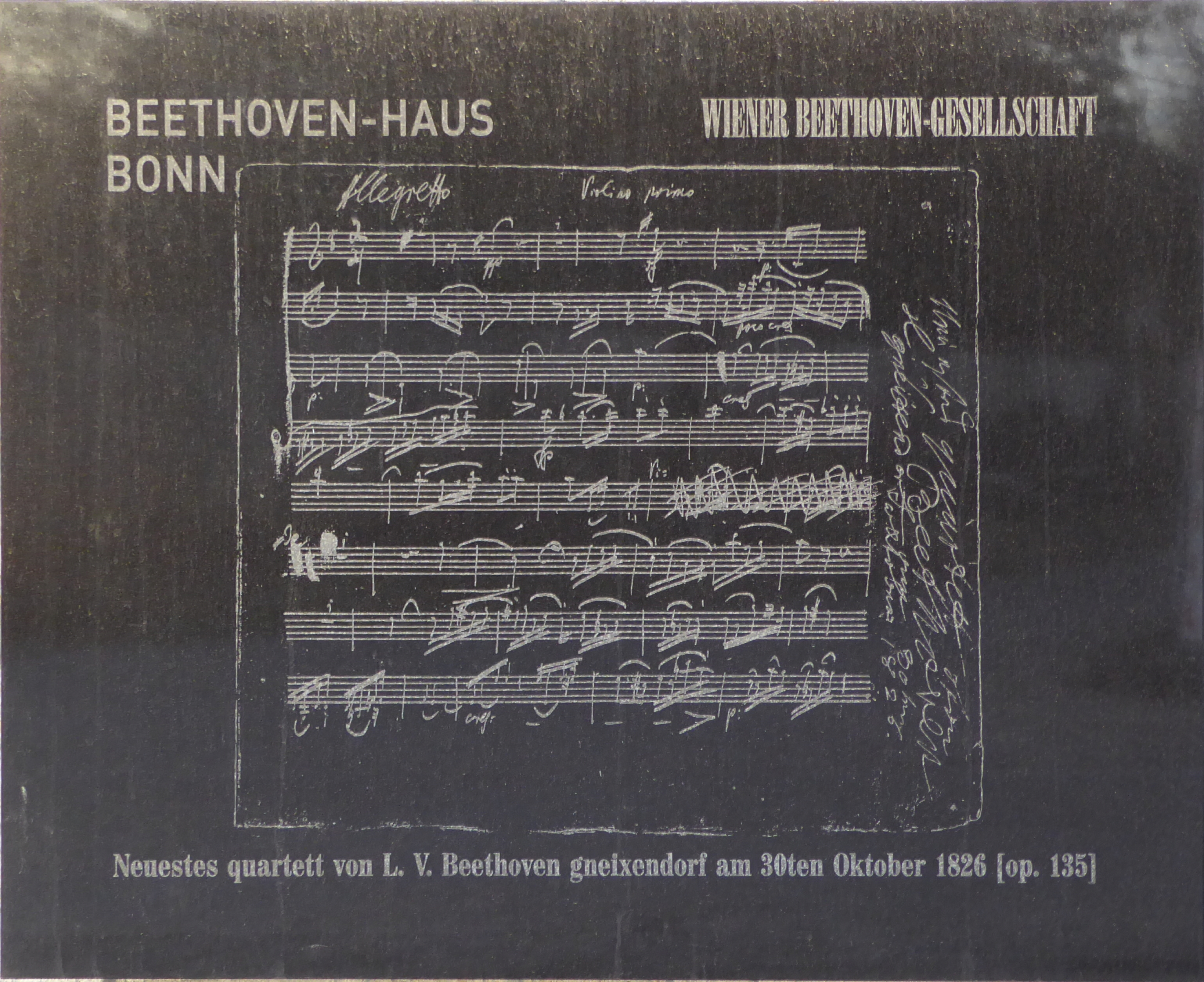 Schloss Wasserhof, Wasserhofstraße 5-9, Gneixendorf, Krems an der Donau, Niederösterreich - Gedenktafel an der Umfassungsmauer